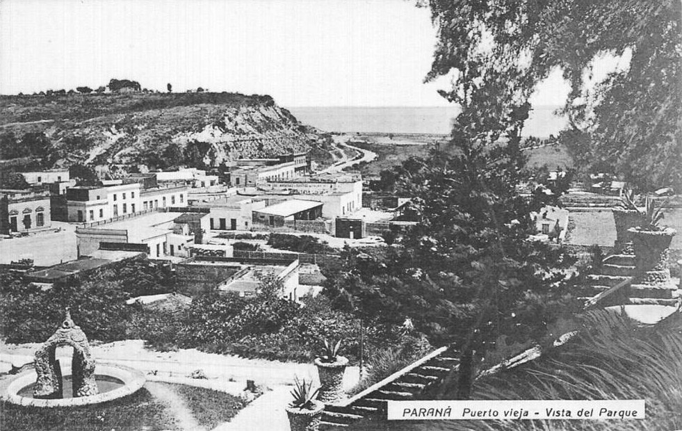 Vista de la barranca y el Puerto Viejo en la ciudad de Paraná, Argentina, desde el Parque Urquiza.